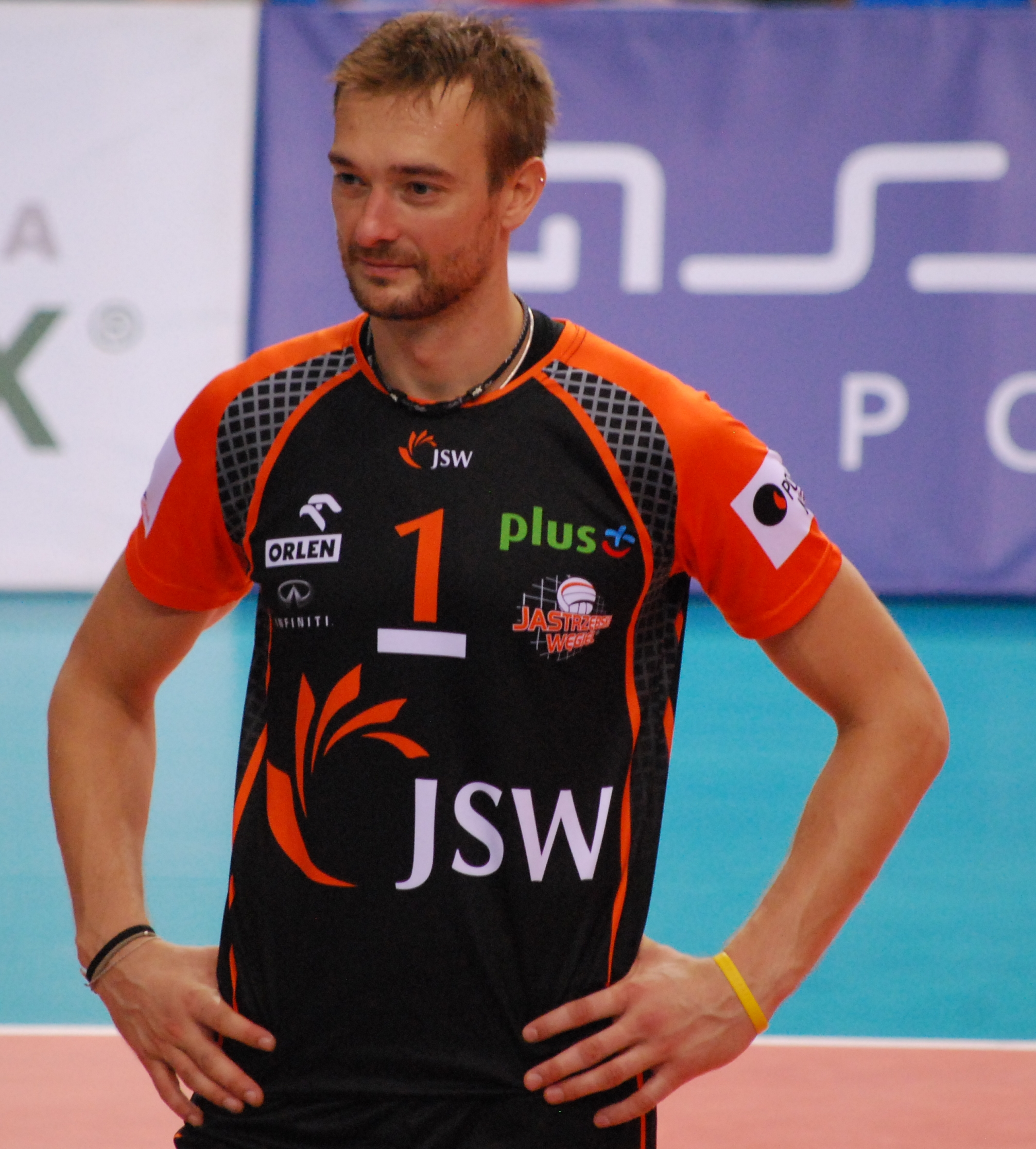 Michał Łasko